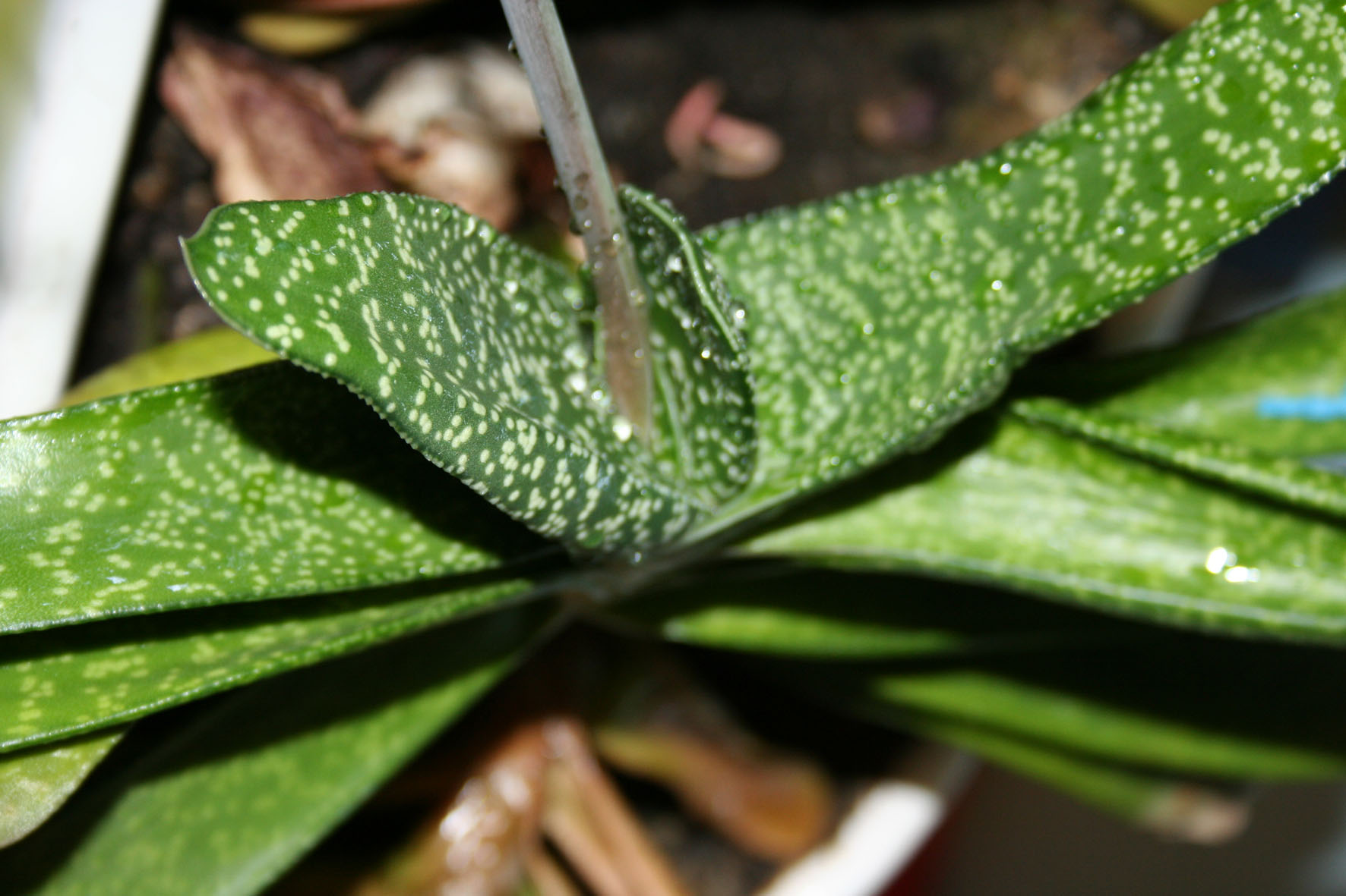 Gasteria carinata - plant